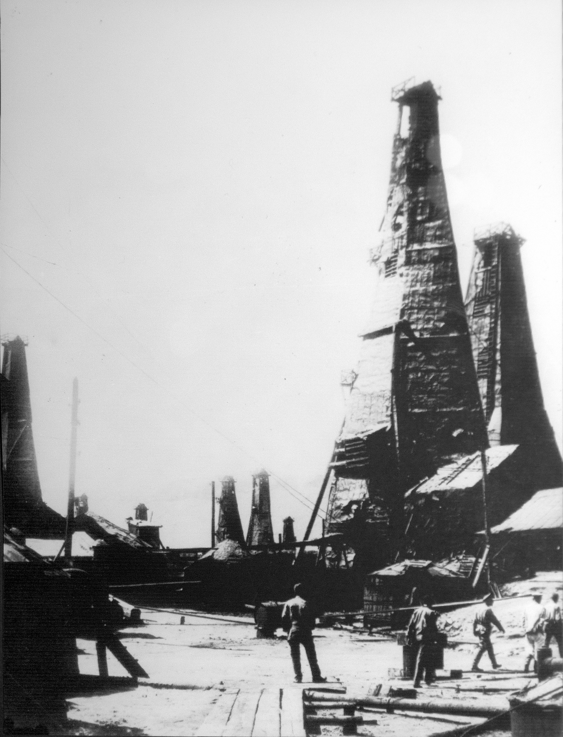 Вышки на нефтепромыслах в Баку